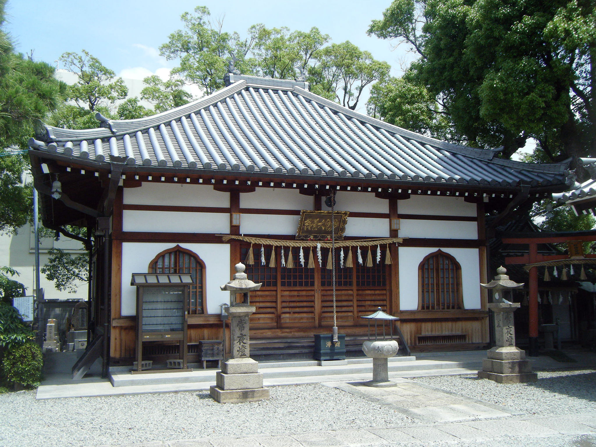 広済寺 妙見堂（開山堂） 兵庫県尼崎市